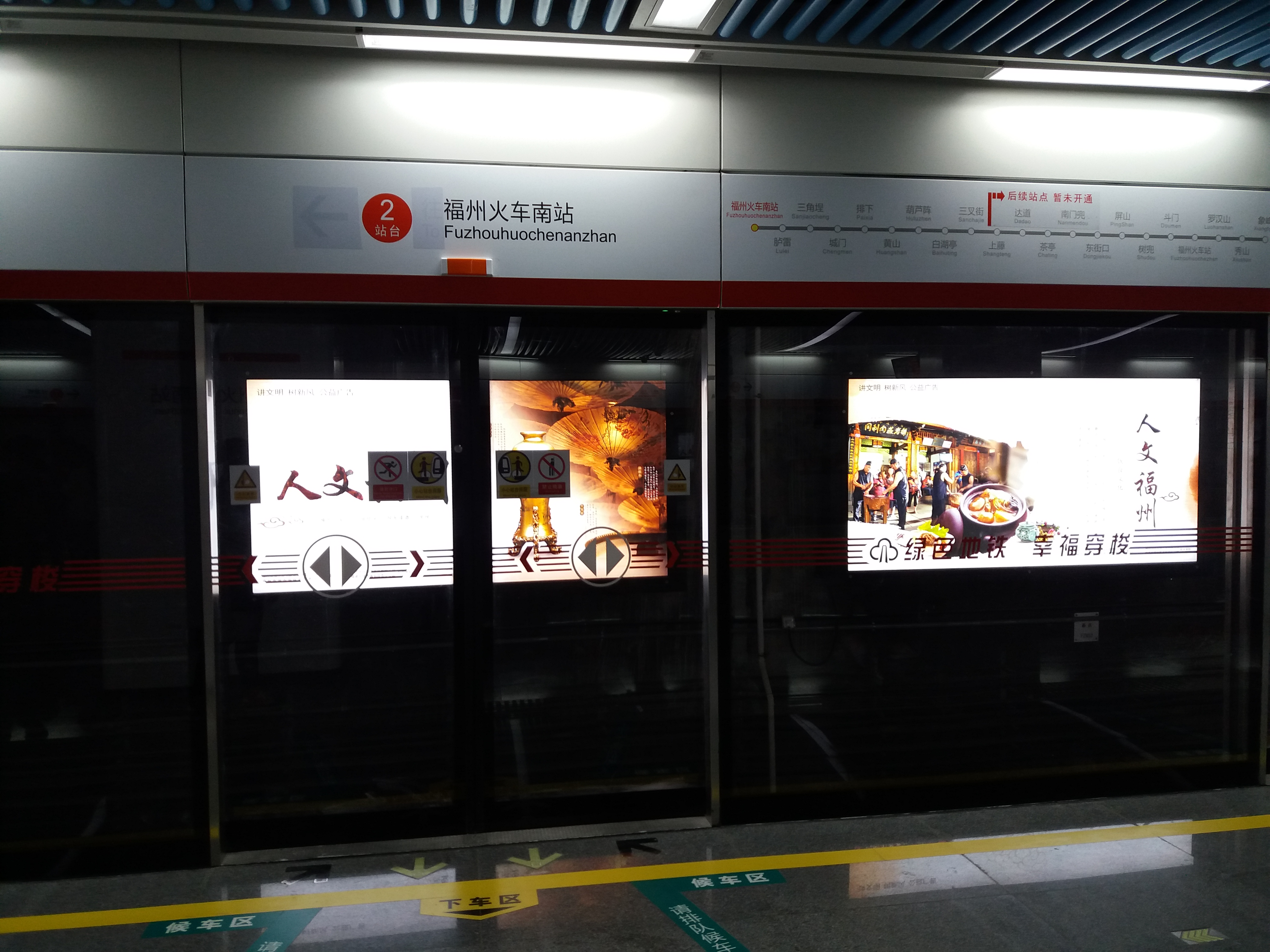 福州地铁一号线“福州火车南站”站候车口